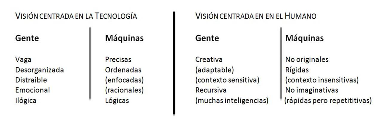 Comparativo de valoraciones al diseñar que conllevan respectivamente los enfoques (visiones) centradas en la tecnología y en el humano [a partir de El Giro Semántico de Klaus Krippendorff]